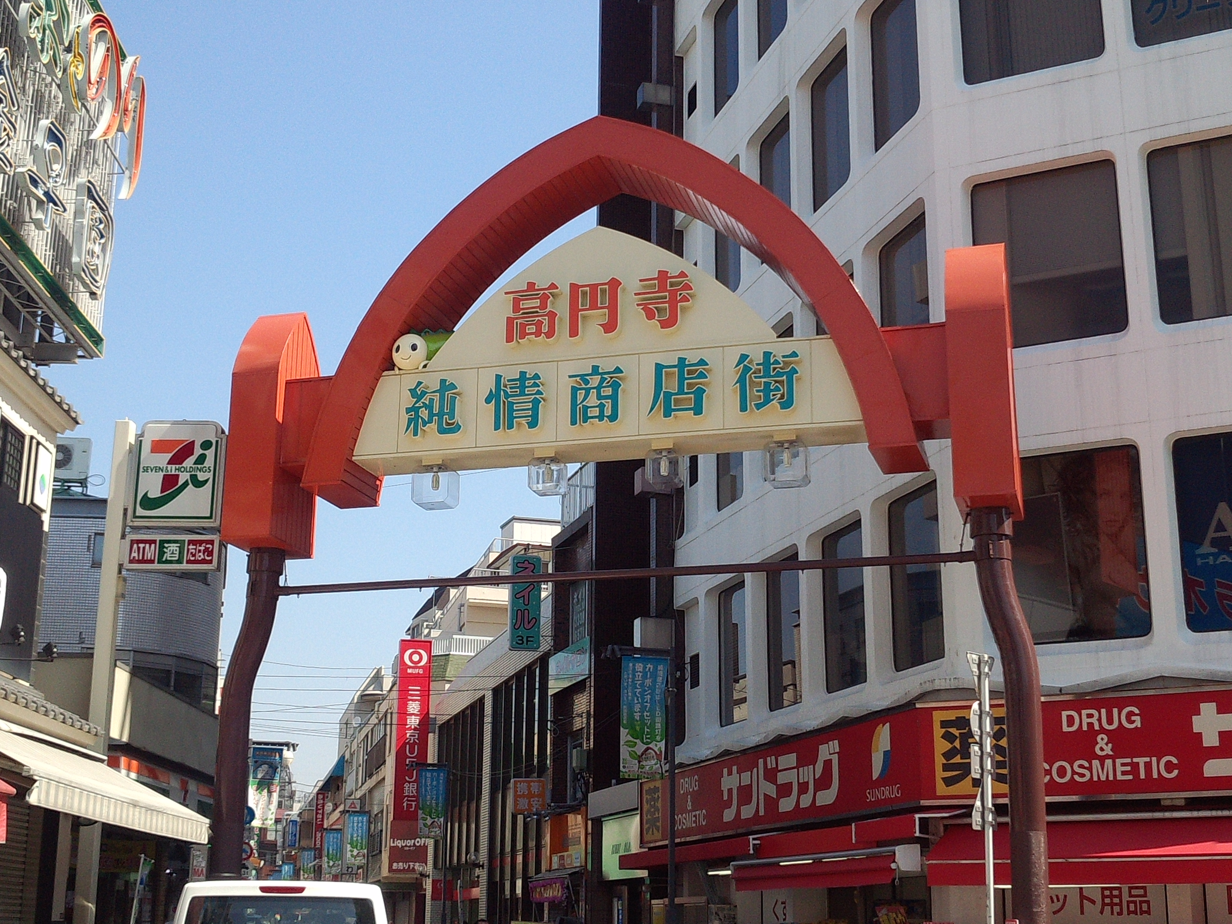 高円寺純情商店街の写真